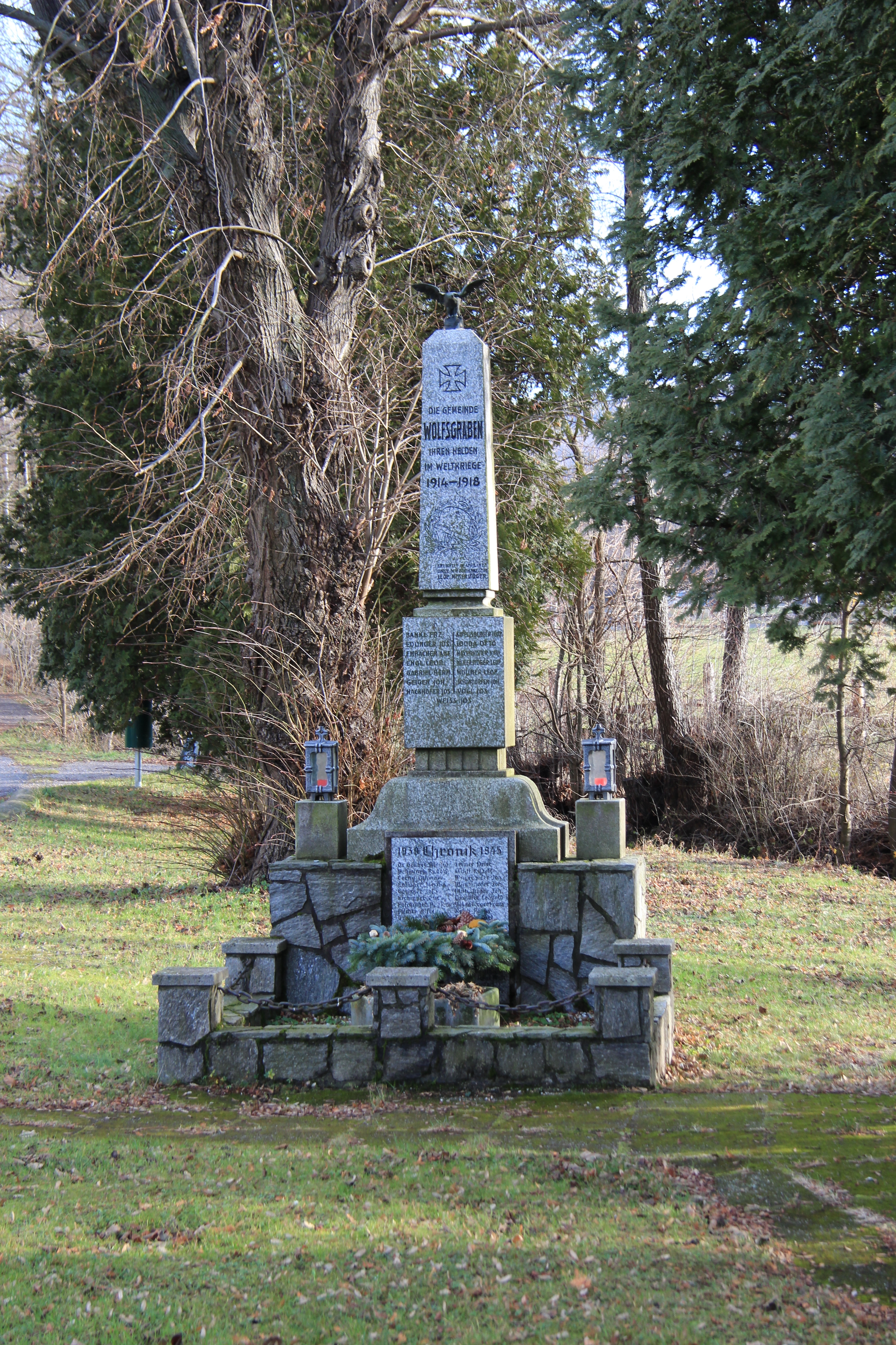 Kriegerdenkmal